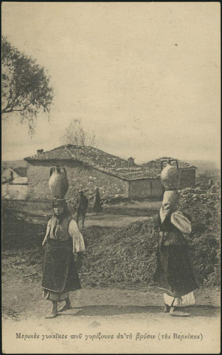 Връбник през Първата световна война.